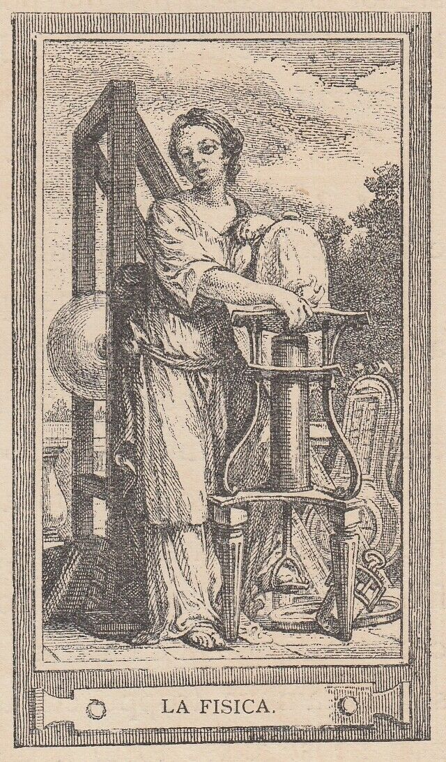 Allegoria - La Fisica - 1890 xilografia